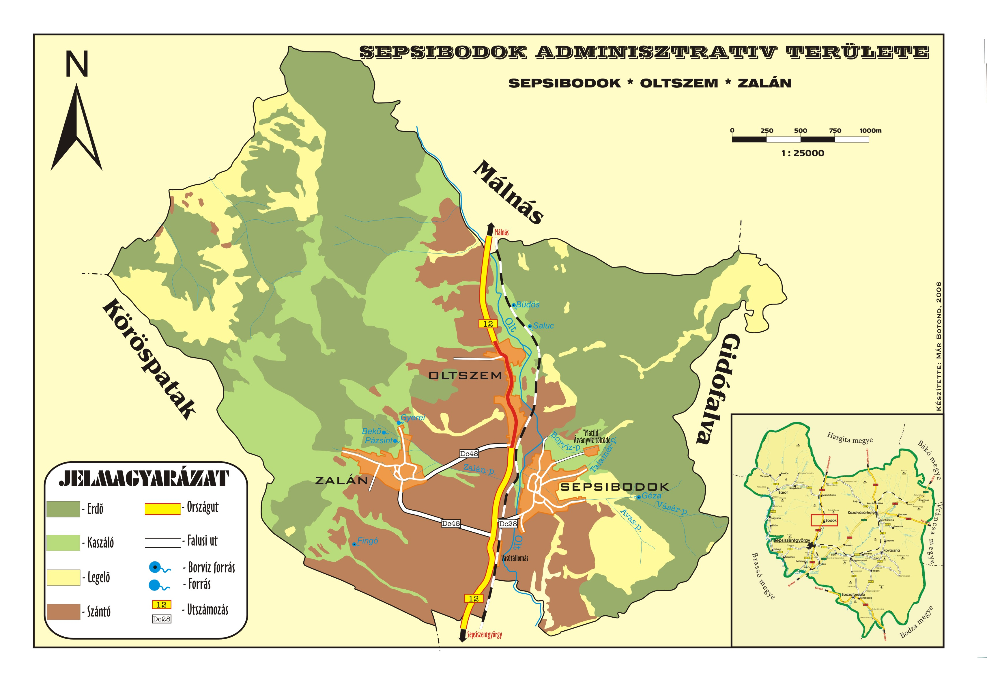 Sepsibodok térképe (Erdély)